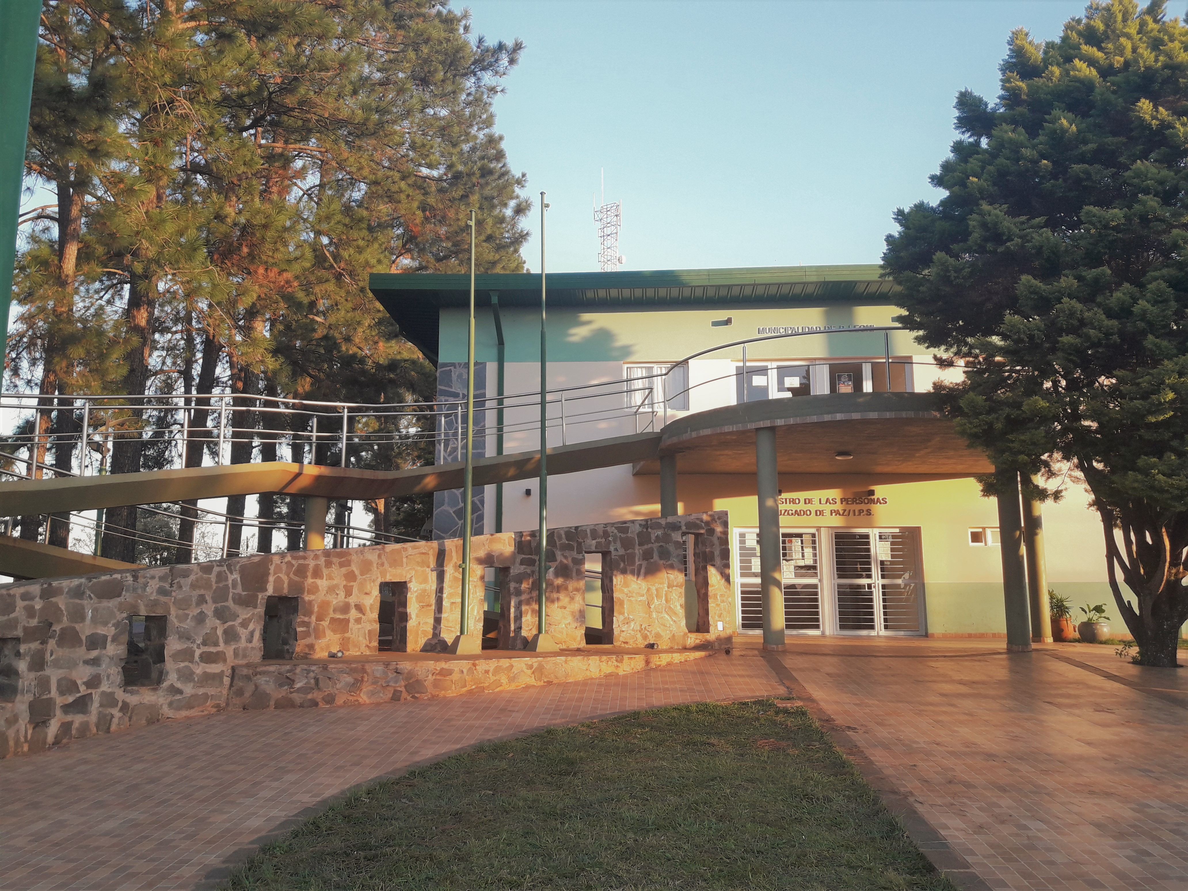 Edificio de la Municipalidad de Puerto Leoni, Registro de las Personas, Juzgado de Paz y delegación del Instituto de Previsión Social (I.P.S.) Fuenteː Periodista Horacio Cambeiro.